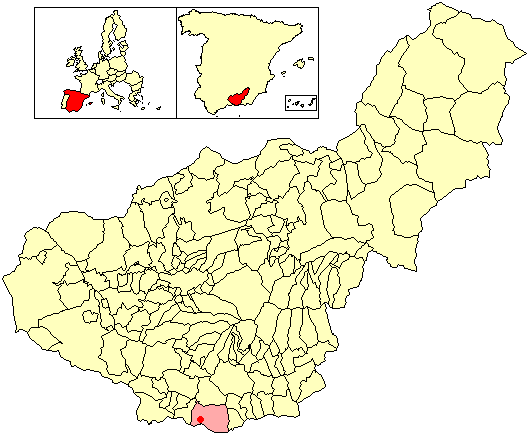 Situación de la localidad de El Varadero (en el municipio de Motril) respecto a la provincia de Granada, en España.